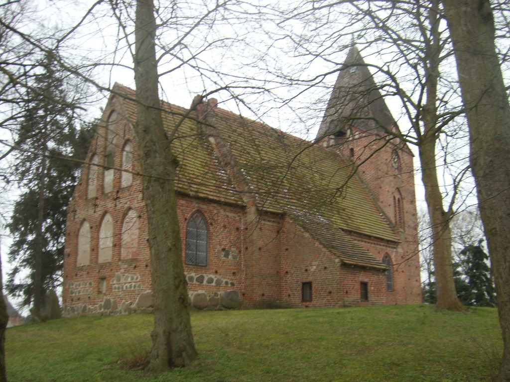 Backsteingotische Dorfkirche von Roggenstorf im Landkreis Nordwestmecklenburg.